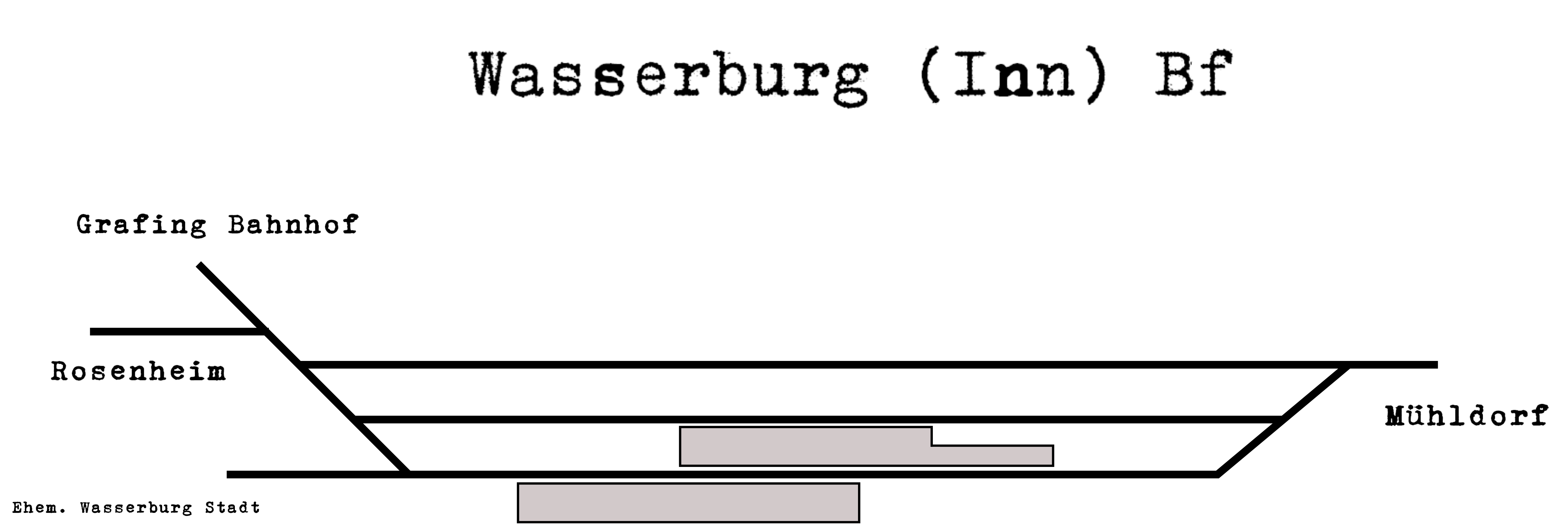 Gleisanlagen des Bahnhofs Wasserburg(Inn)